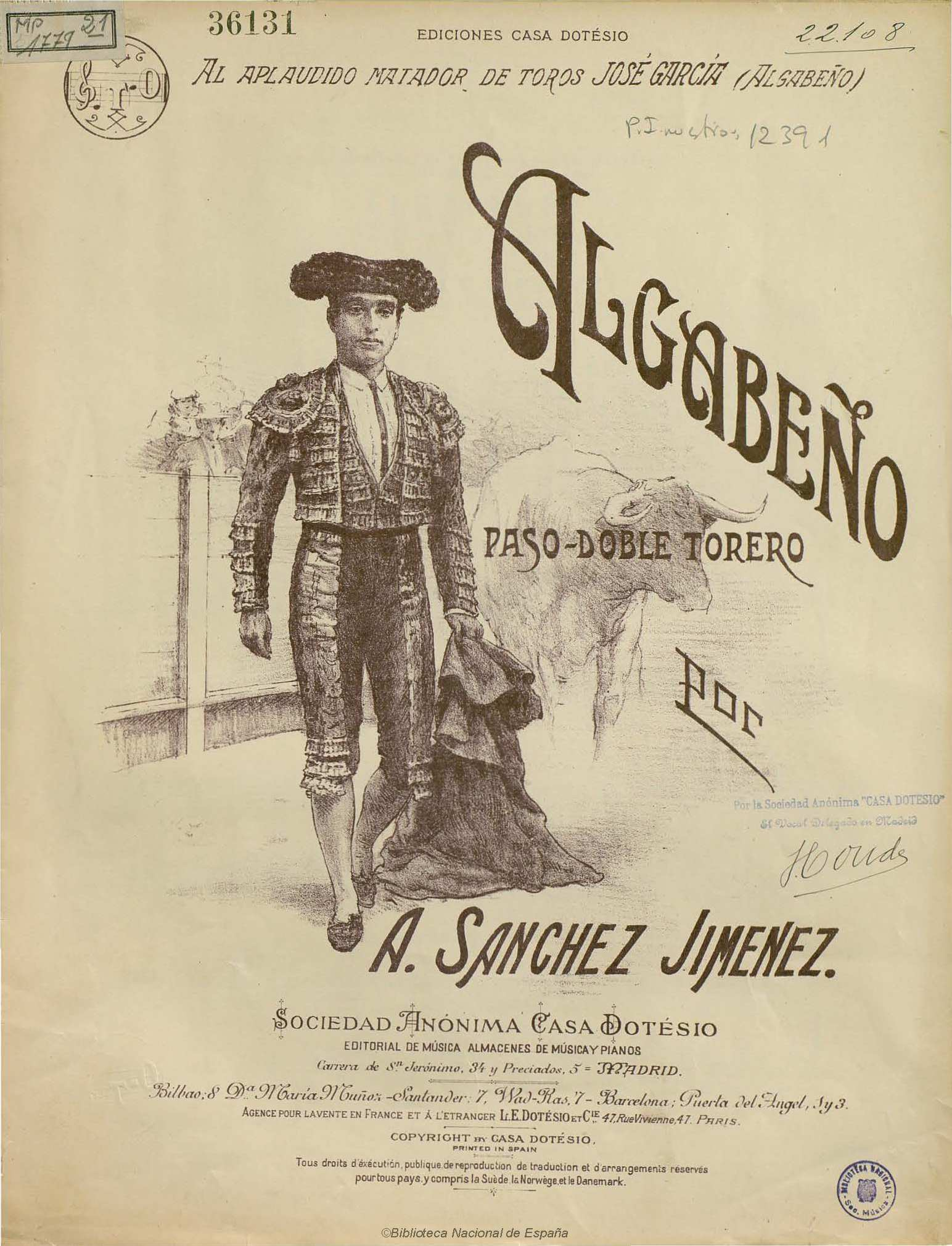 Portada ilustrada para la partitura del pasodoble "Algabeño" de Antonio Sánchez Jiménez. Casa Dotesio, Madrid, 1908. Dedicatoria: "Al aplaudido matador de toros José García (Algabeño)". Biblioteca Nacional de España